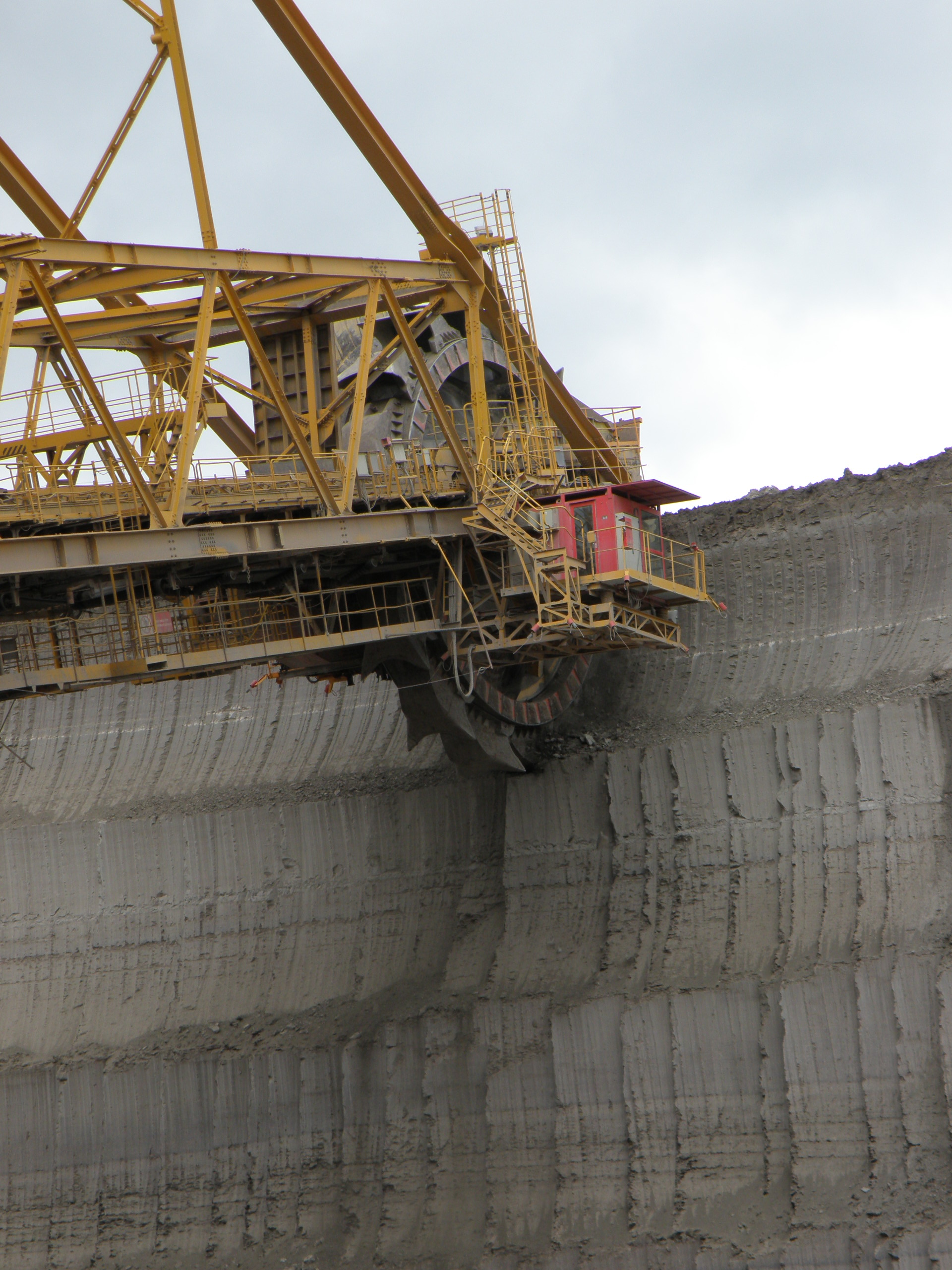 Koleso ve skrývce, 2009.